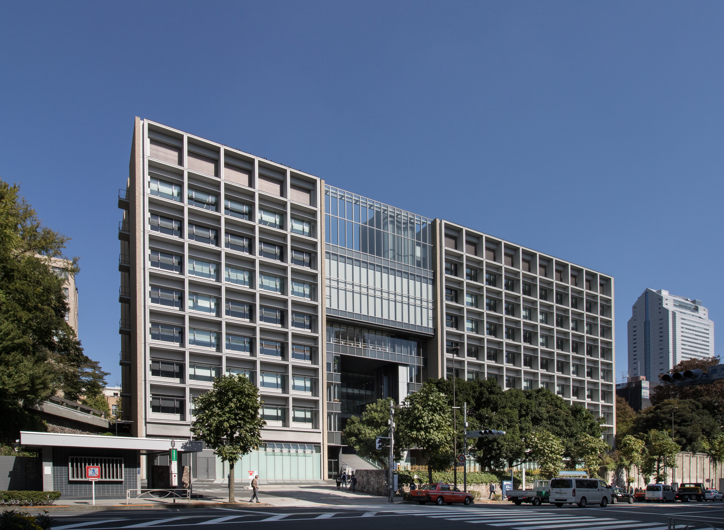 慶応義塾大学、三田キャンパス。正門、南校舎。